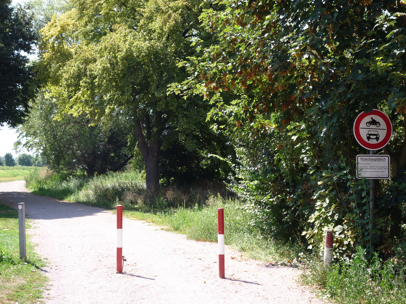 Vom Fähranleger Budenheim geht geradeaus vor dem Deich ein schöner Weg durch die Rheinaue und später am Altrhein entlang. Hinweis für Radfahrer: Inoffizieller Rheinradweg von Budenheim nach Ingelheim. Anstelle hinter dem Hochdeich (mit Sicht auf die Obstplantagen) führt er vor dem Sommerdeich durch Streuobstwiesen und entlang dem Altrheinufer. Auch wenn später der Weg sehr schmal wird, sollte man den Sommerdeich nicht überqueren. Man wird dann belohnt mit einem Weg am Altrhein, der allerdings nur bei Trockenheit geeignet ist.